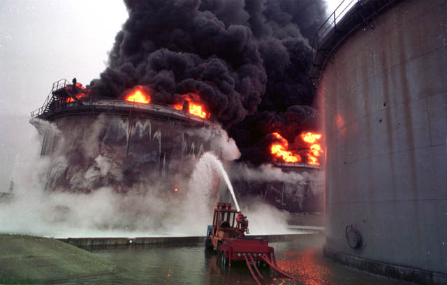 Нови Сад 1999. године. Нато авијациј током бомбардовања СР Југославиа свакодневно је гађала рафинерију нафте и постројења нафтне индустрије србије